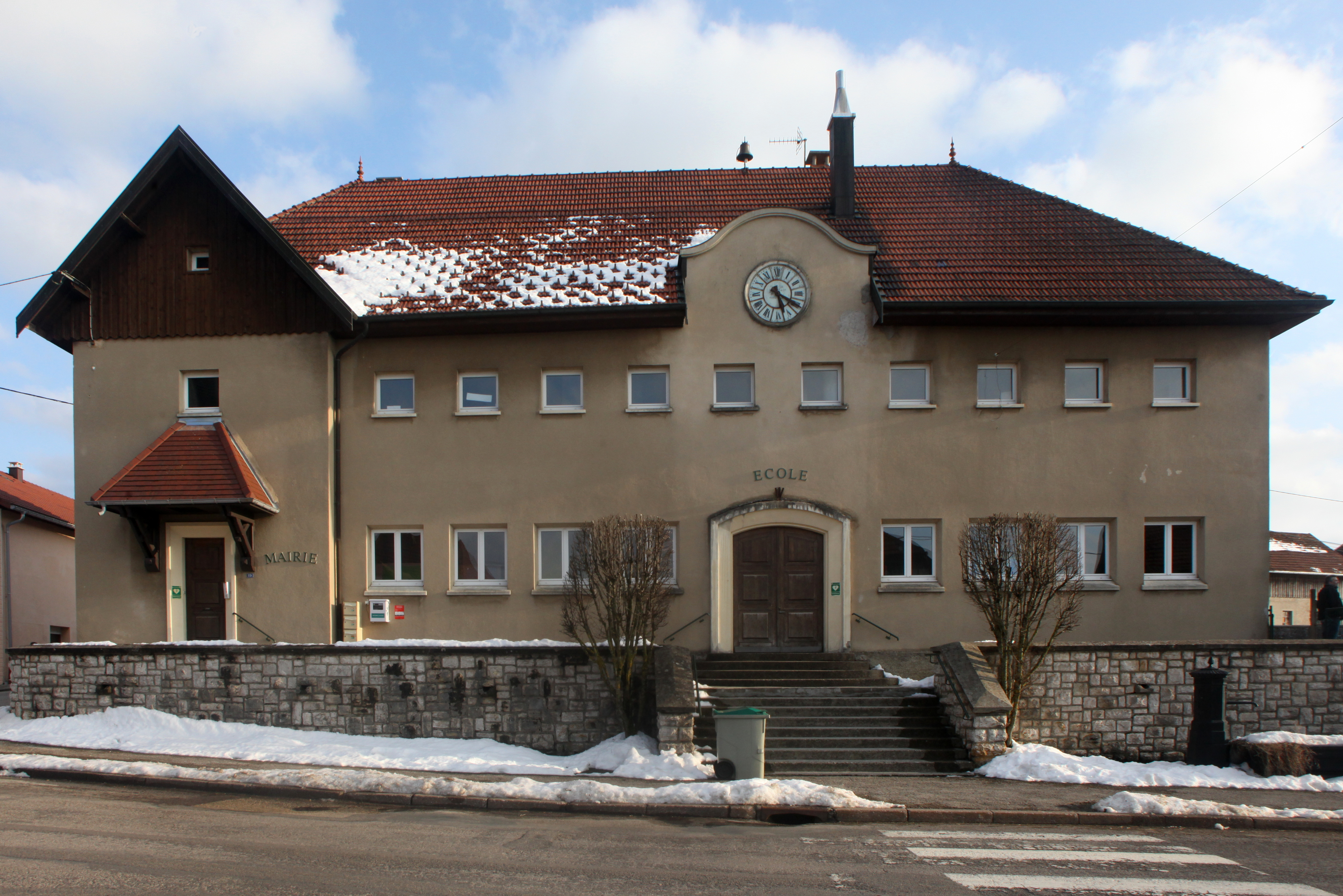 Mairie de Sainte-Colombe (Doubs).